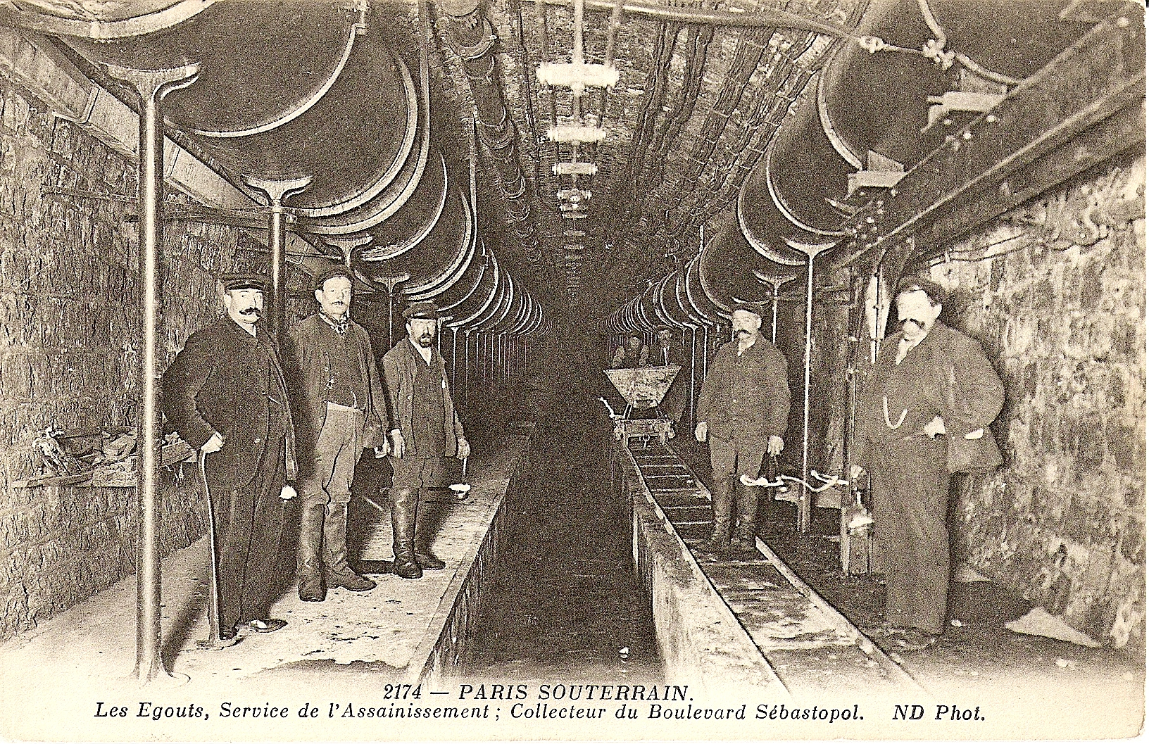 Carte postale ancienne éditée par ND Phot, N°2174PARIS SOUTERRAIN - Les égouts, service de l'assainissement - Collecteur du Boulevard Sébastopol